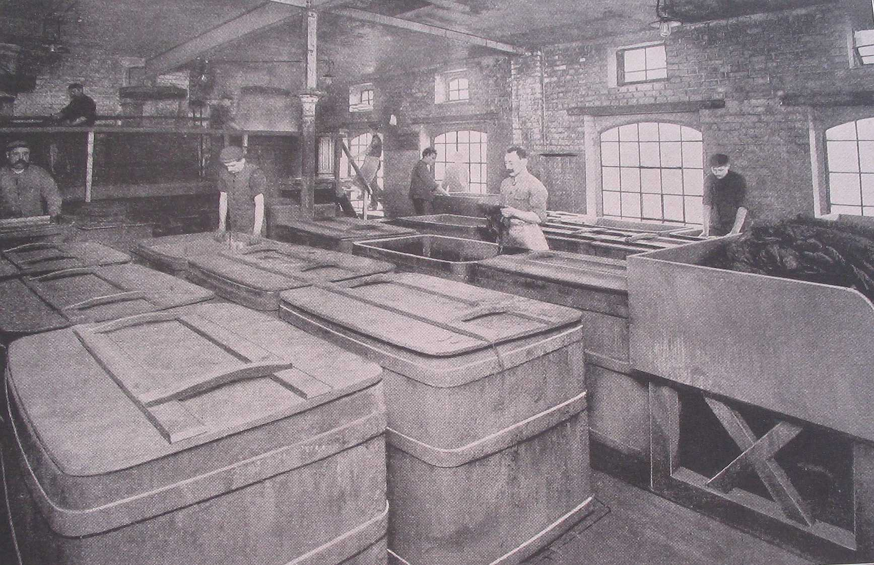 300 Jahre Familie Thorer - 50 Jahre Theodor Thorer. Seite 55. Persianer-Färberei. Leipzig-Lindenau